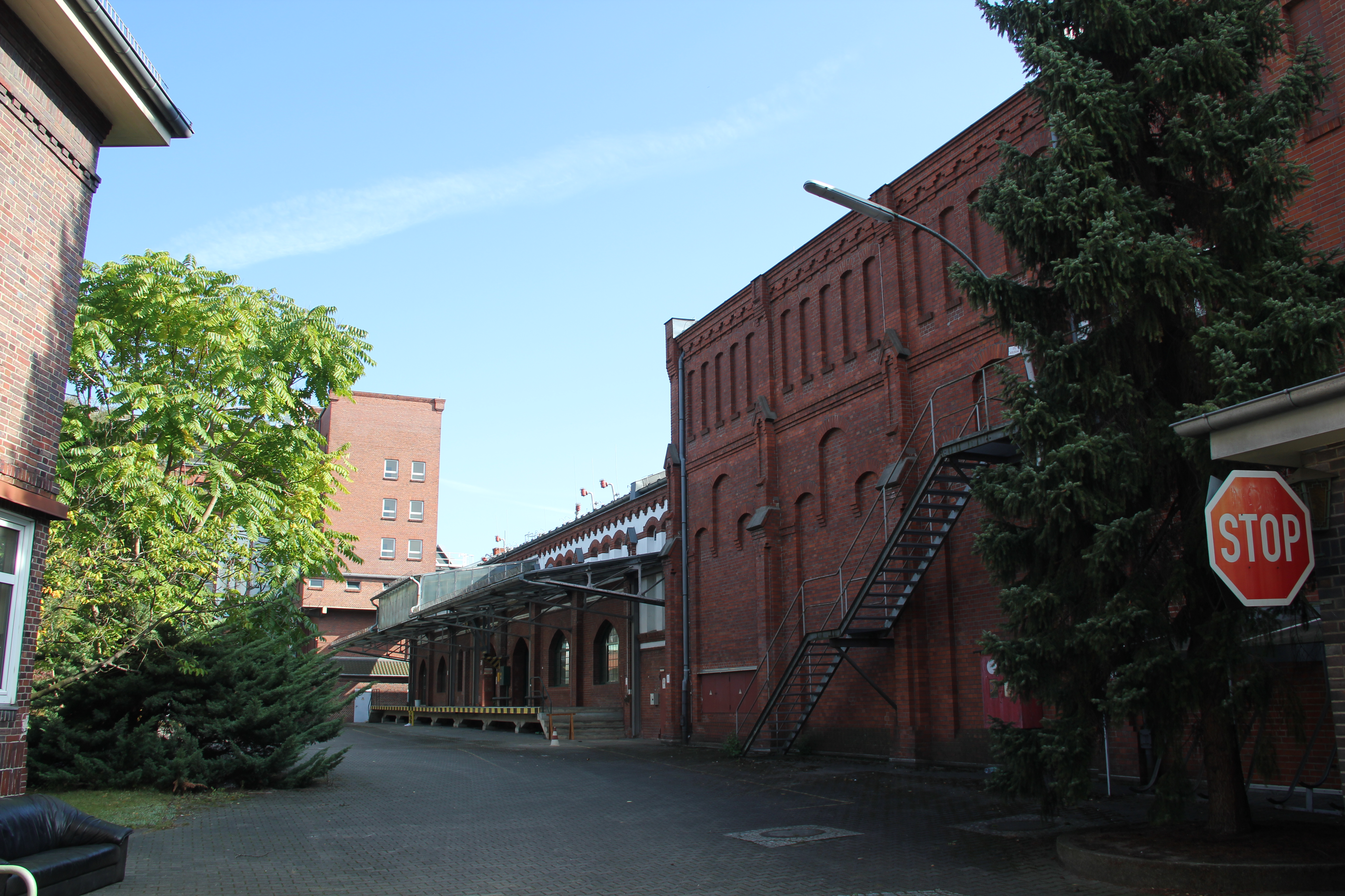 Provinzstraße 40–44, 13409 Berlin Werksanlage der Ostdeutschen Spritfabrik GmbHThis is a photograph of an architectural monument.